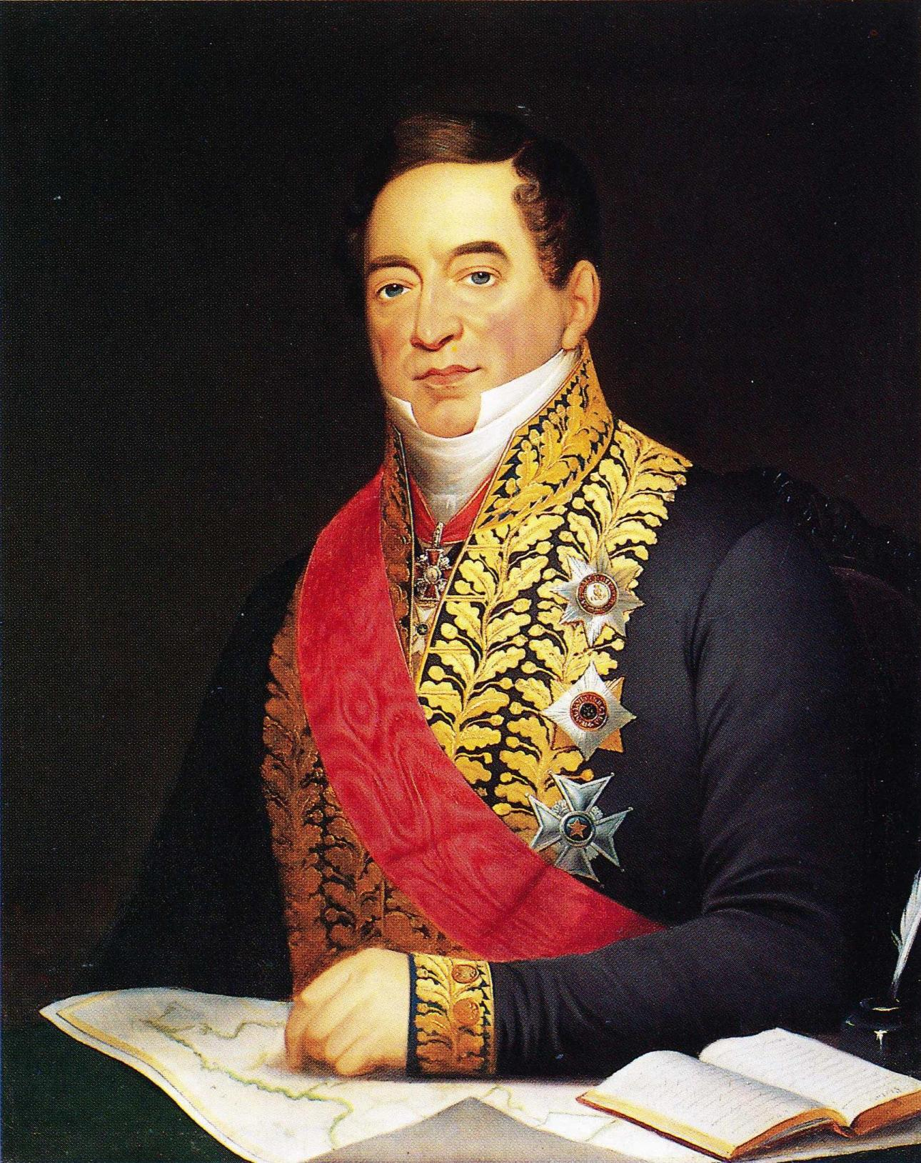 Ministerivaltiosihteeri Robert Henrik Rehbinder (1777–1841). Taidemaalari Godenhjelm oli Pietarissa Rehbinderin suojatti, joka hänen ansiostaan sai opiskeluaikanaan apurahan keisarillisesta käsikassasta.